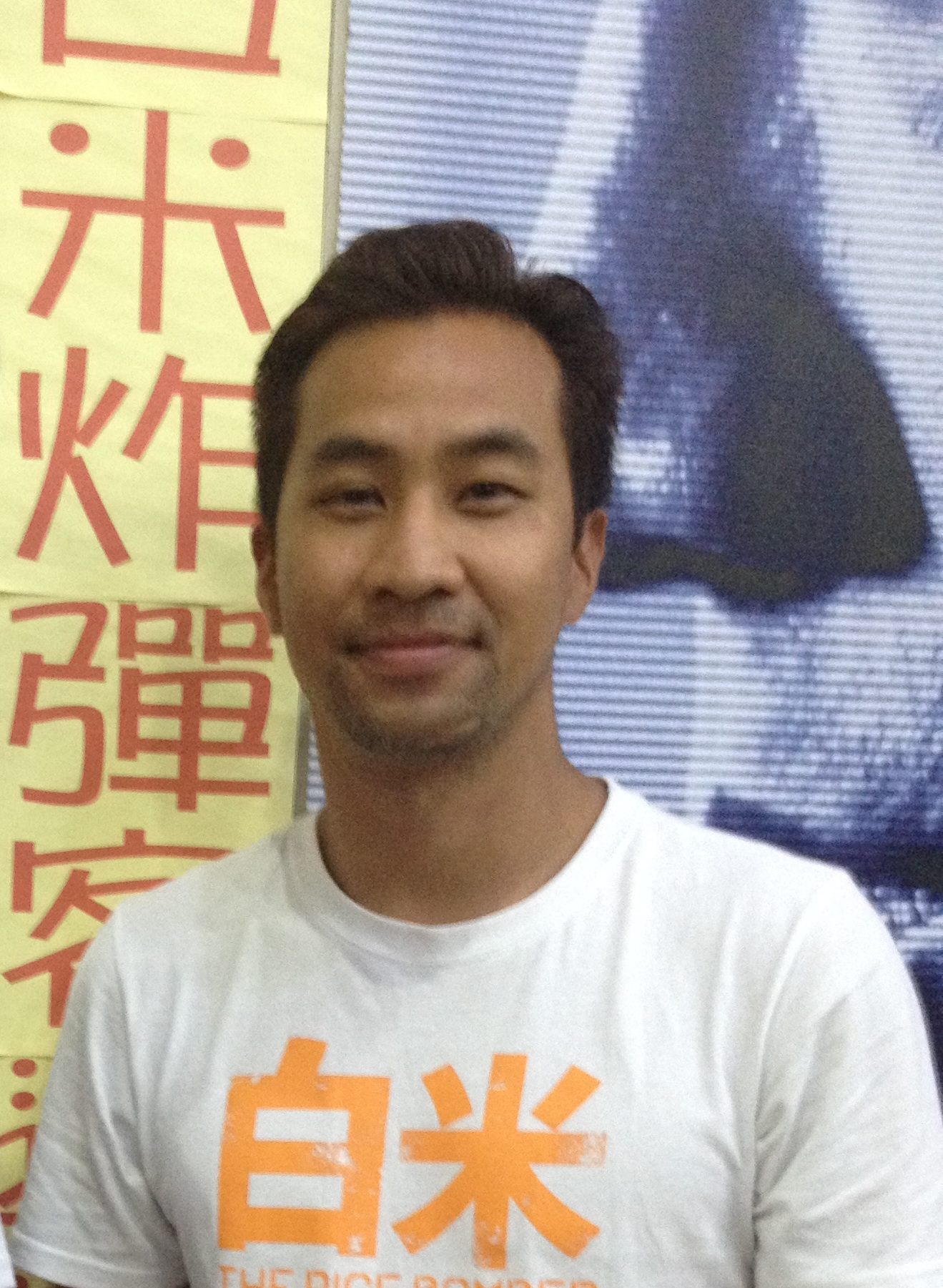 黃健瑋